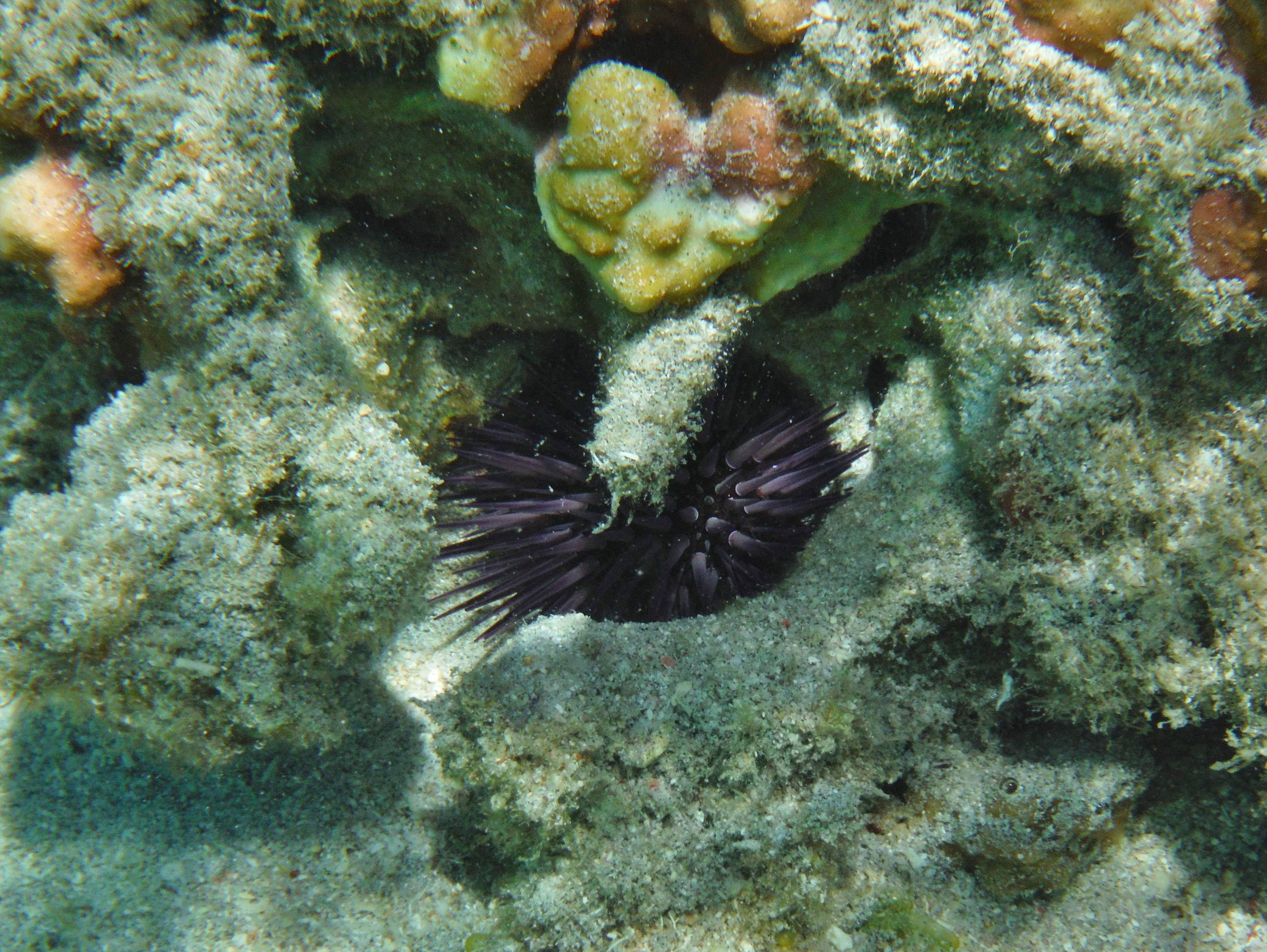 Oursin perforant (Echinometra mathaei) à la Réunion.